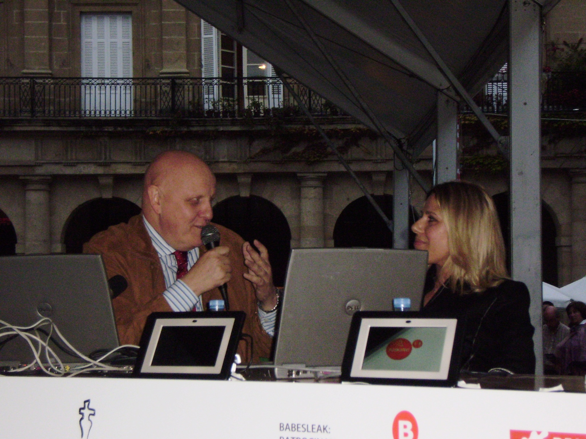 Leontxo Garcia eta Susan Polgar Bilbon, 2008an